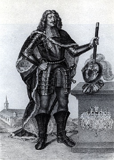 Markgraf Wilhelm von Baden (* 30. Juli 1593 in Baden-Baden; † 22. Mai 1677 in Baden-Baden) war von 1621 bis 1677 Regent der Markgrafschaft Baden-Baden.